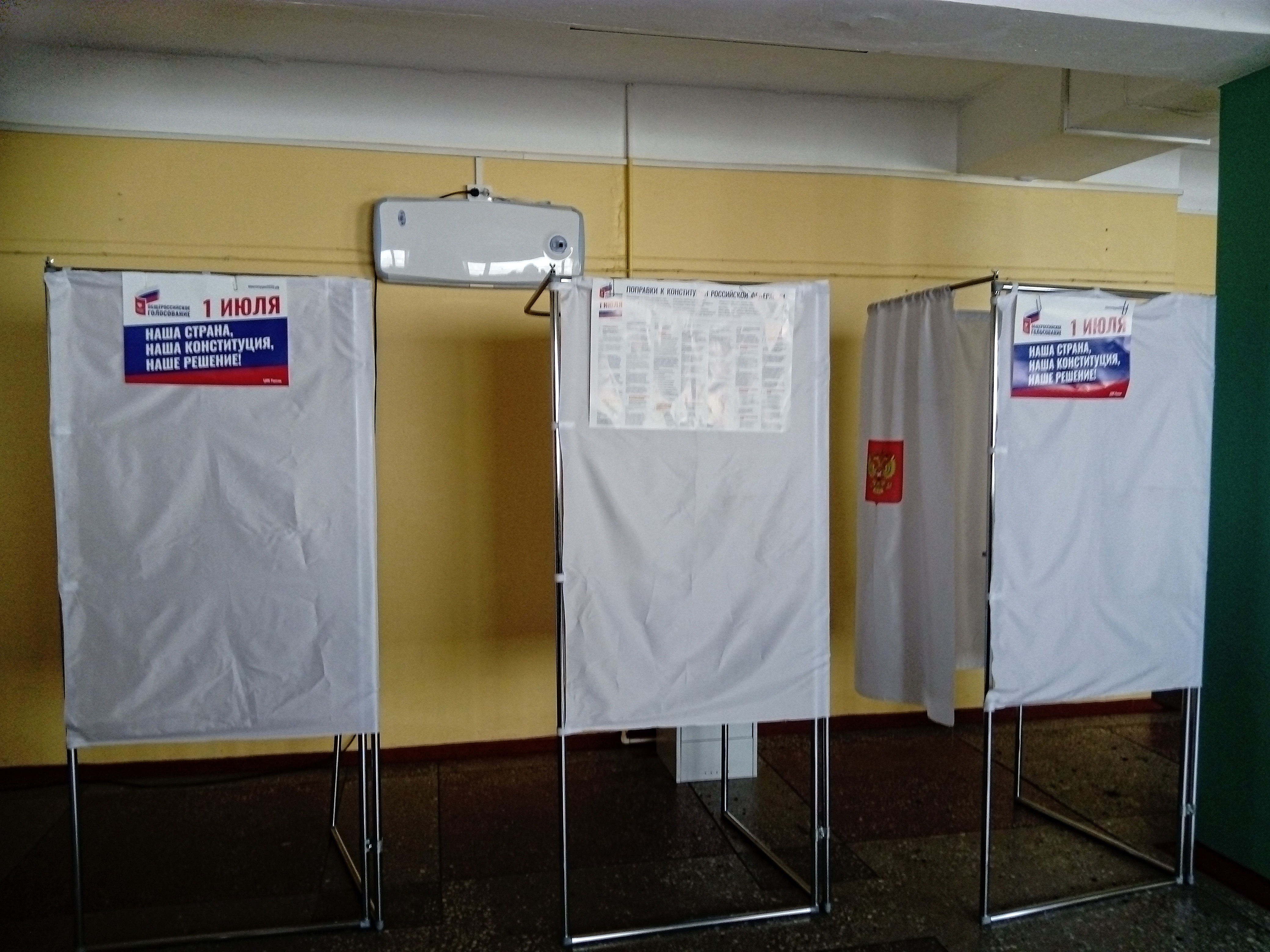 Общероссийское голосование (досрочное) по поправкам к Конституции. Петропавловск-Камчатский, Россия. Избирательный участок № 41 (школа № 40). 25 июня 2020